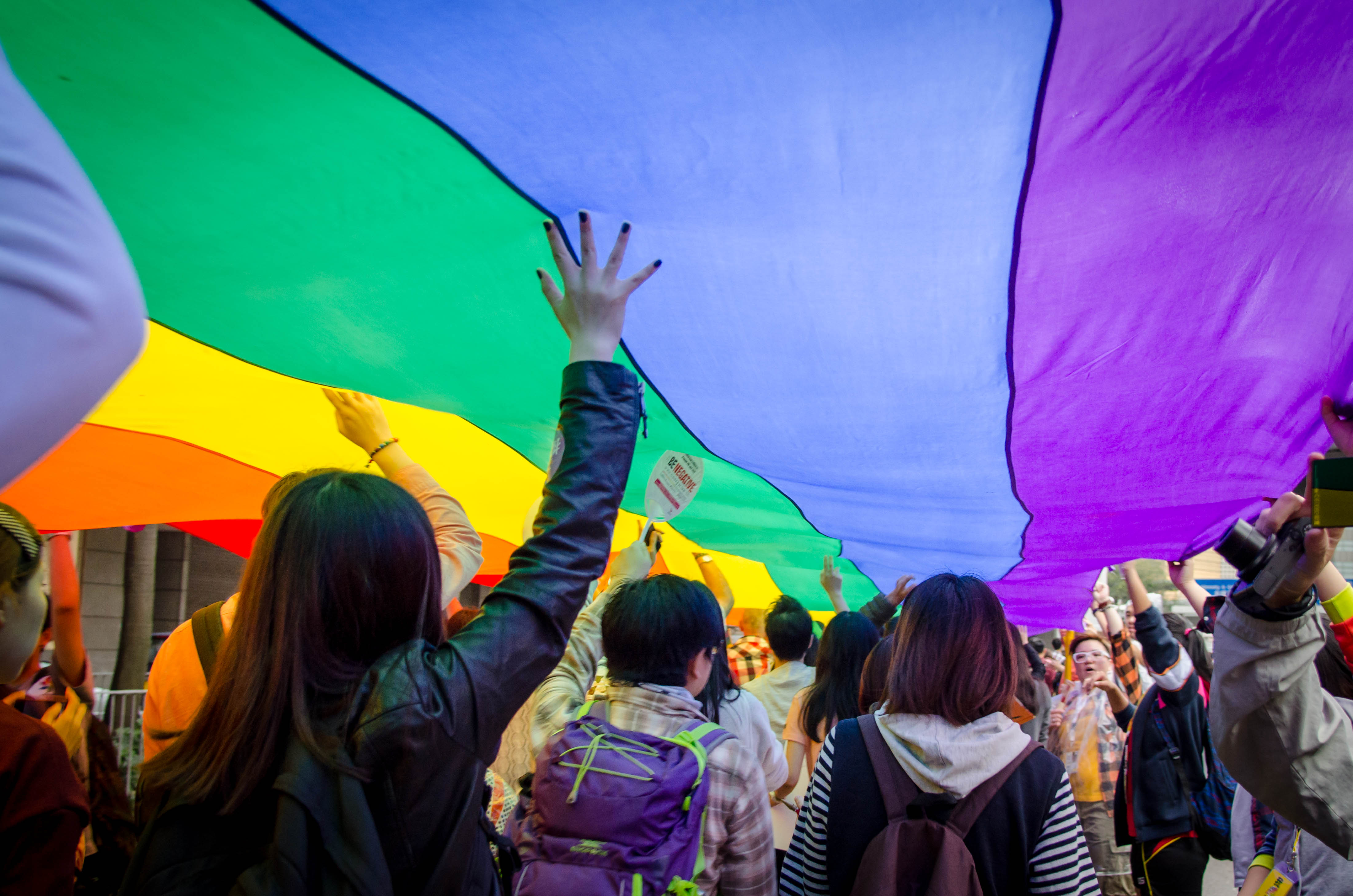 香港同志遊行/HONG KONG PRIDE PARADE 2014